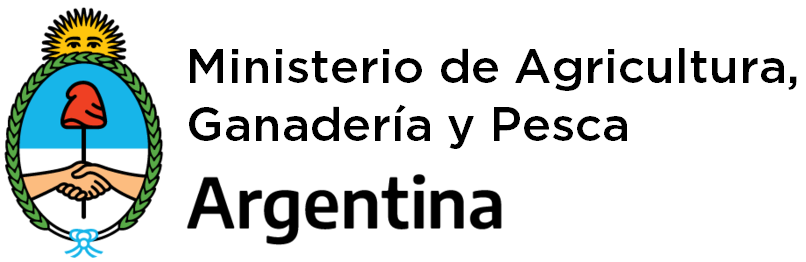 Ministerio de Agricultura